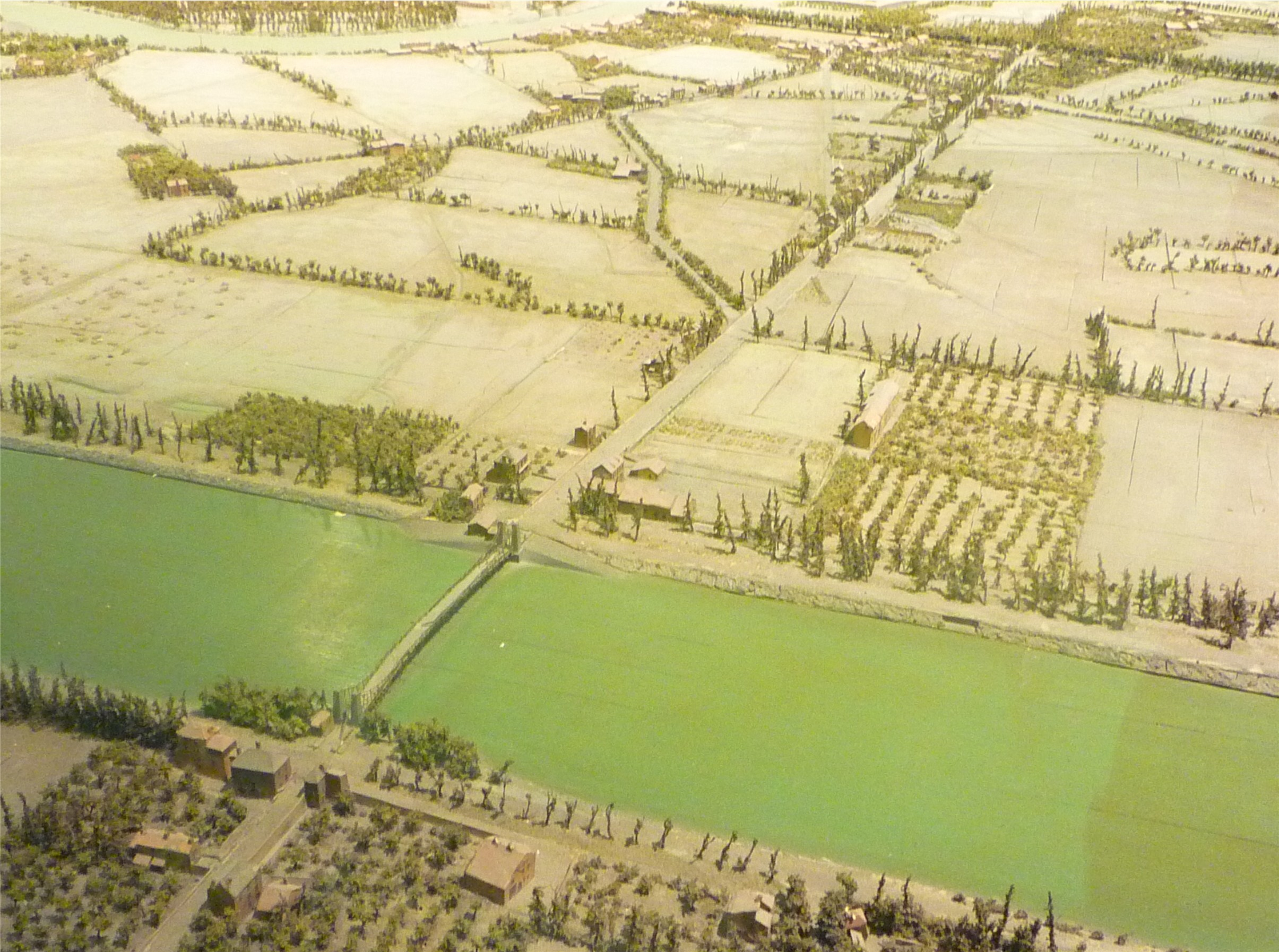 Site du pont en chaîne de fer sur le Drac. Plan-relief de Grenoble (1848)